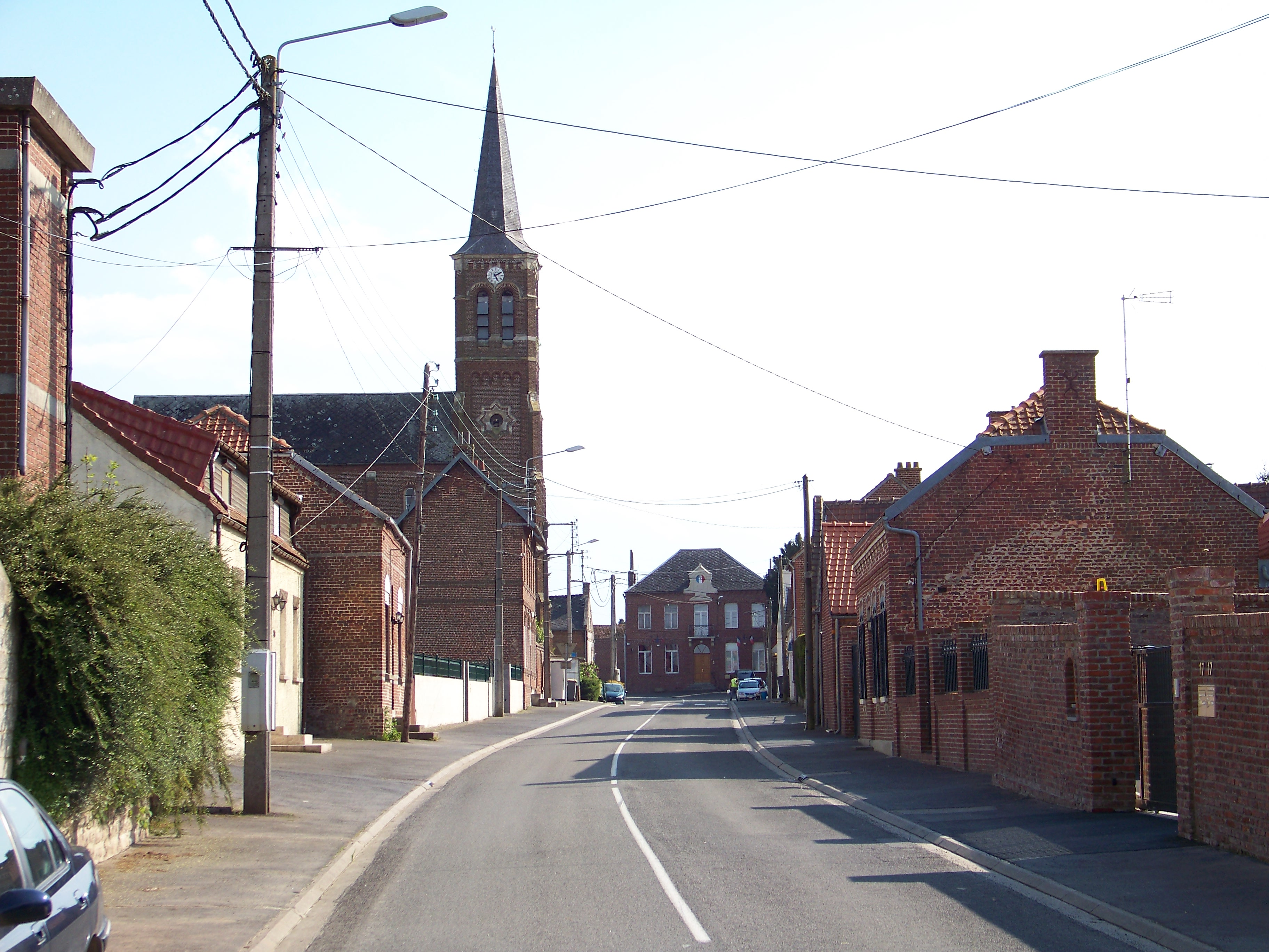 Eglise et mairie de Haucourt-en-Cambrésis